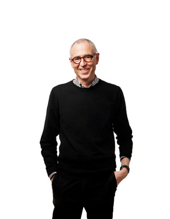 Arkitekt